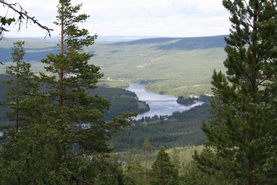 Hanestad sentrum sett fra Hanekampen